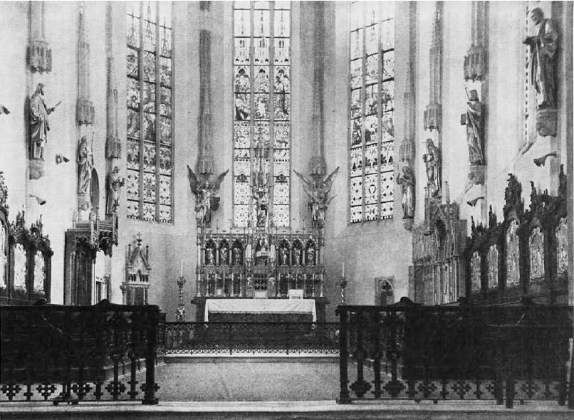 Oltarni prostor (prezbiterij) leta 1943.